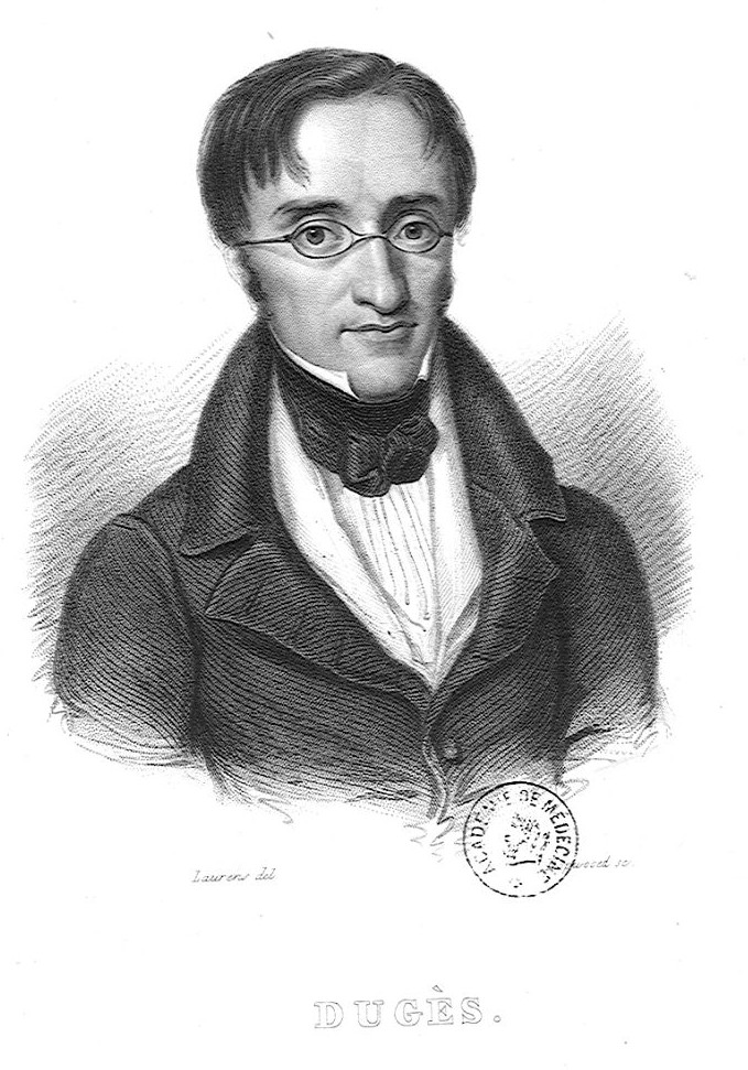 Portrait d'Antoine Dugès (1797-1838)